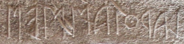 Stele di Larth Ninie. Casa Buonarroti, Firenze. Iscrizione LARTHIA NINIEŚ.